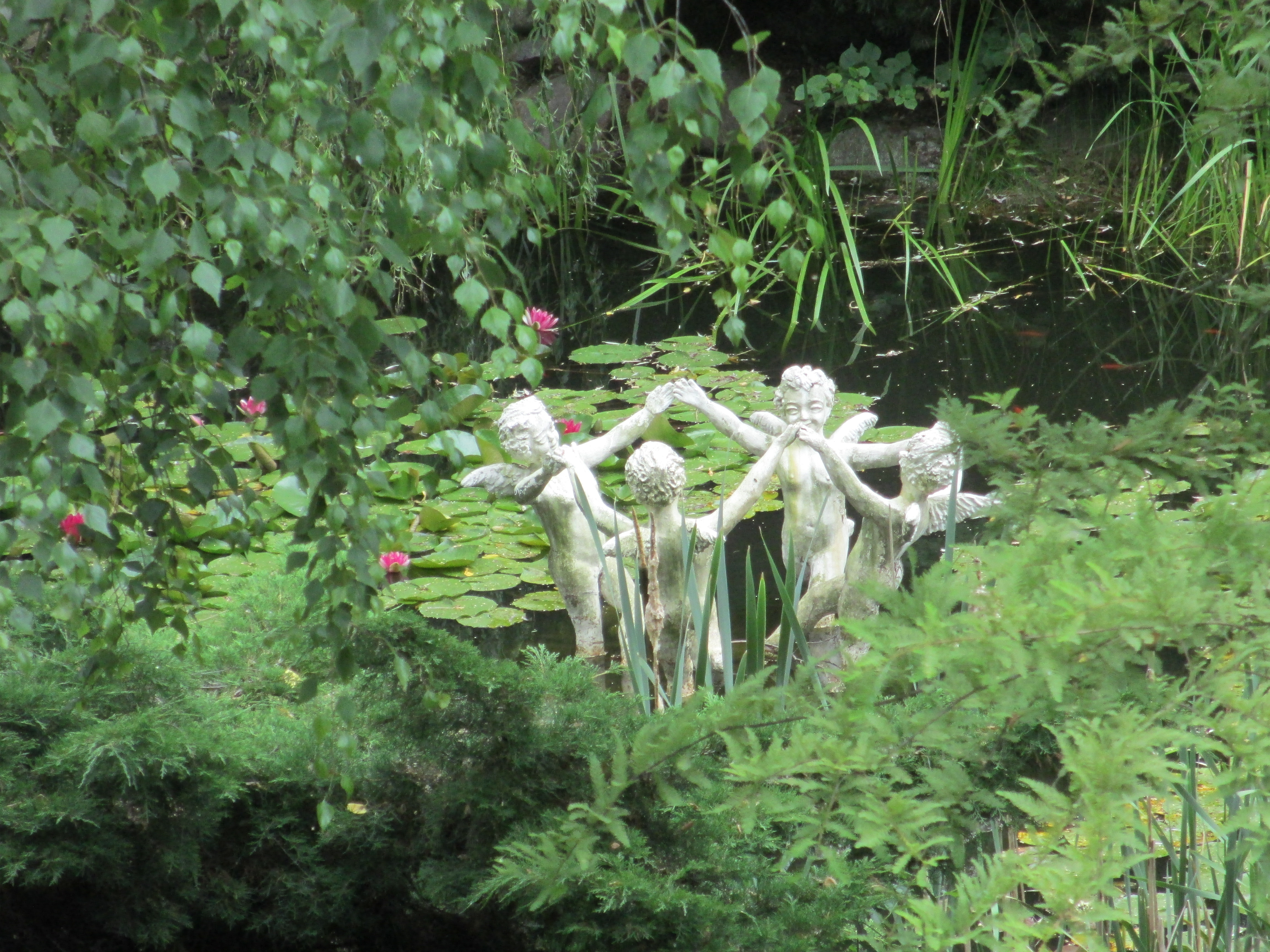 Aniołki w Sanktuarium MB Licheńskiej